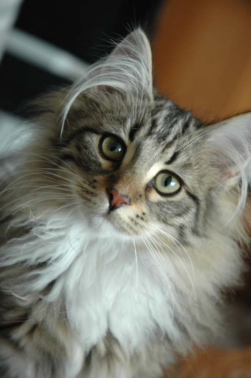 Norwegische Waldkatze, 5 Monate, Portrait